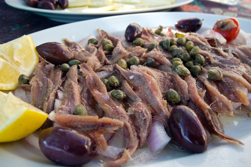 Slani inćuni